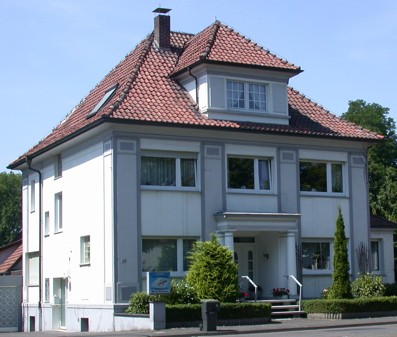 Deutschland - Nordrhein-Westfalen - Kreis Lippe - Bad Salzuflen - Schötmar: Haus 'Schülerstraße 29'